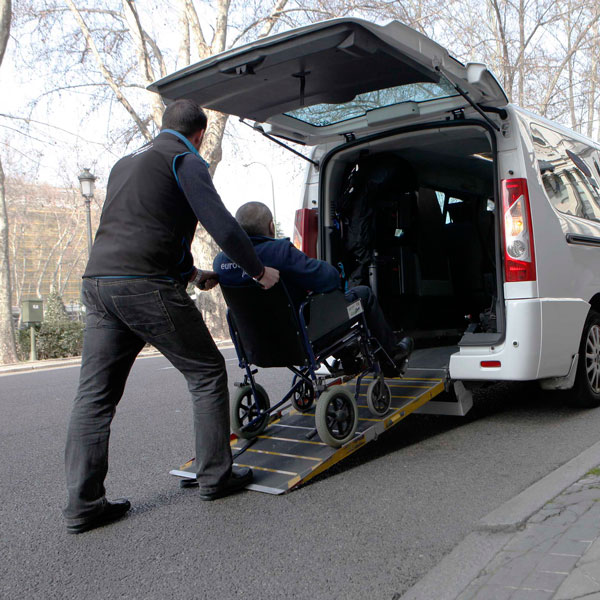 A partir de mañana 1 de abril, y durante el plazo de un mes, el Ayuntamiento de Madrid abre la II Convocatoria de Régimen Especial Eurotaxi con el objetivo de incrementar el número de taxis adaptados, y atender así la demanda de las personas con problemas de movilidad.Para esta convocatoria, en la que los titulares de licencias de taxi que deseen acogerse a este régimen especial podrán presentar sus solicitudes, se establece un cupo general de 300 licencias en seis años.